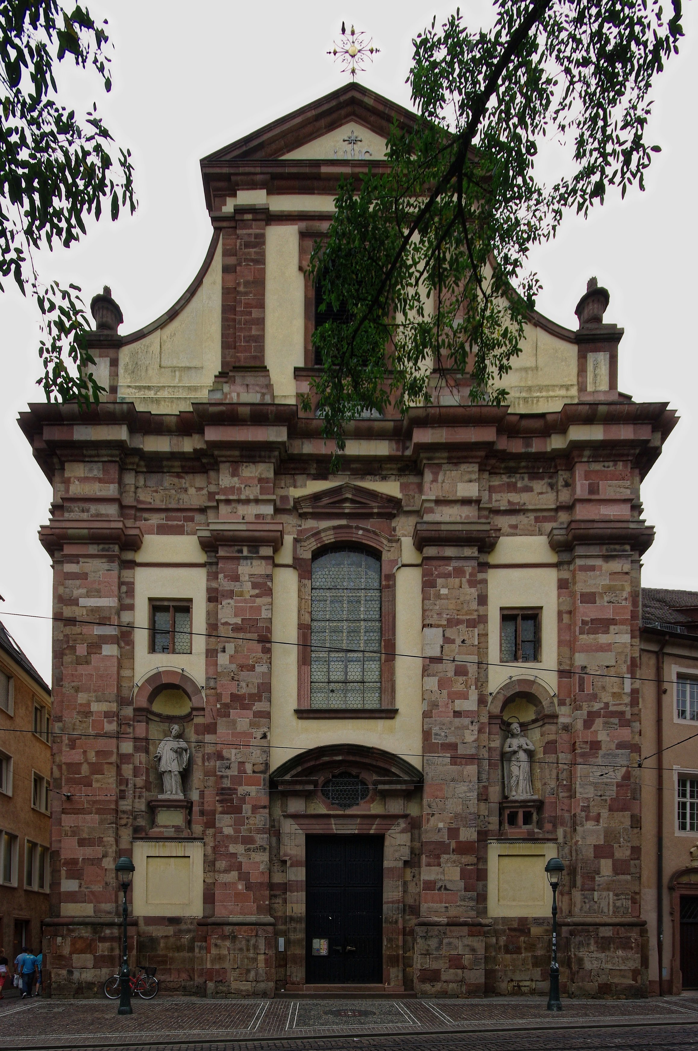 Die Jesuitenkirche in der Bertoldstraße in Freiburg, auch Universitätskirche genannt